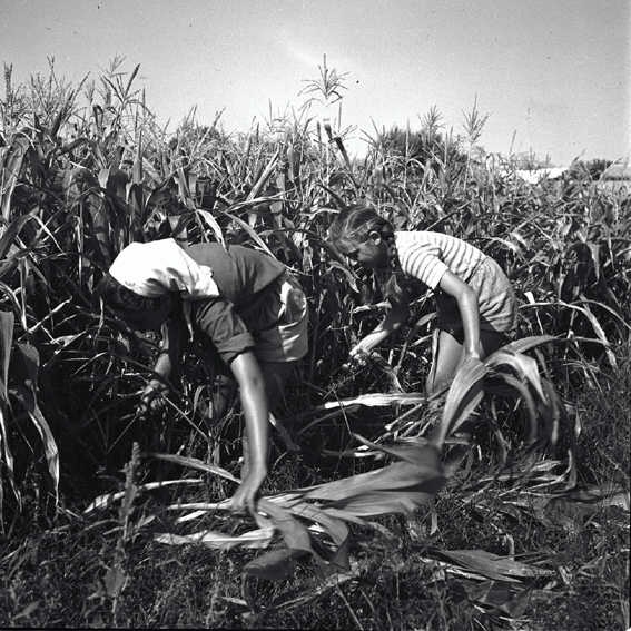 כפר ויתקין - קציר הסתויון המשמש מספוא לבהמות